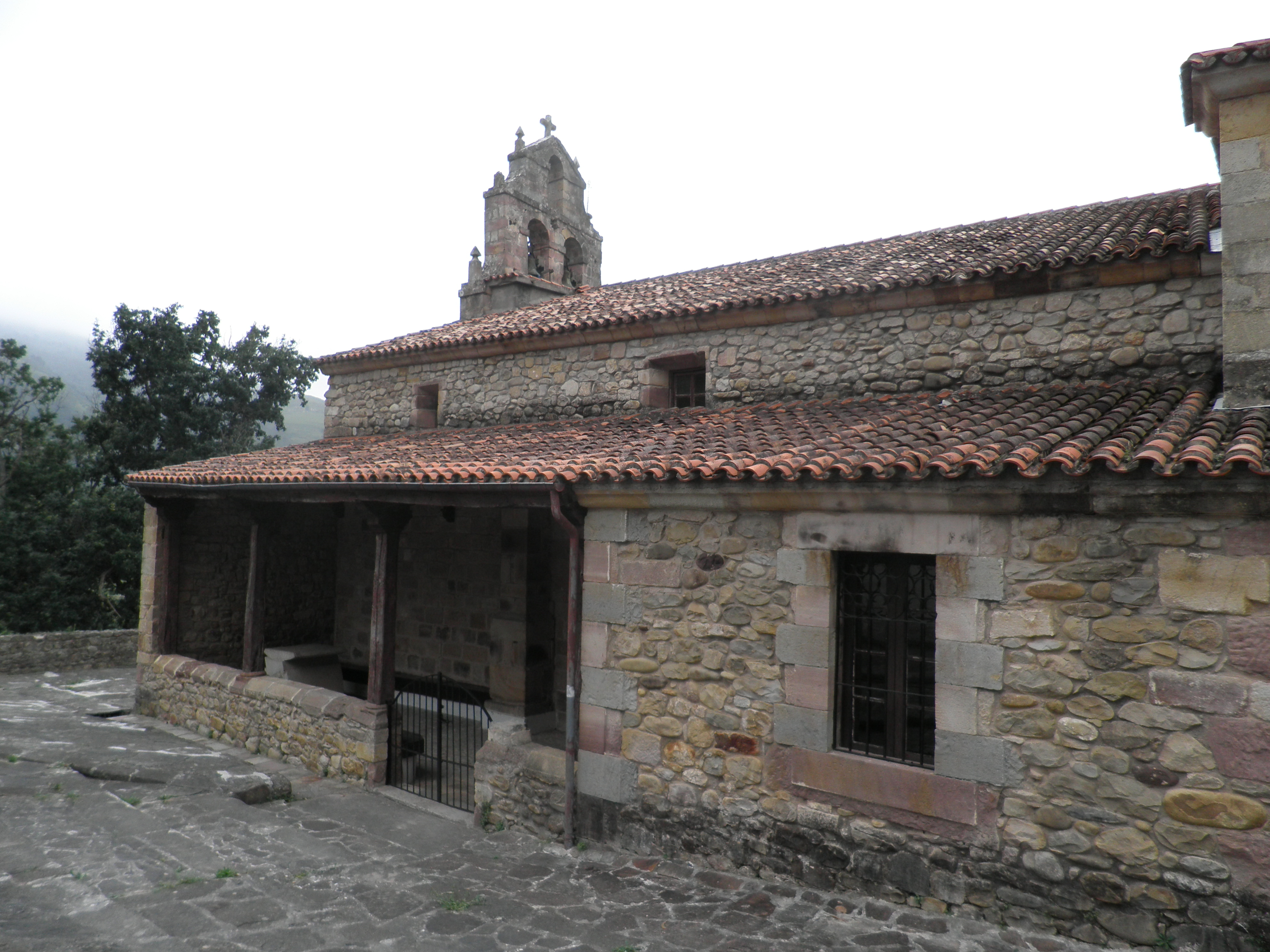 Porxada i entrada lateral a l'esglèsia de Santa Cecília a Villasevil (Santiurde de Toranzo, Cantàbria)